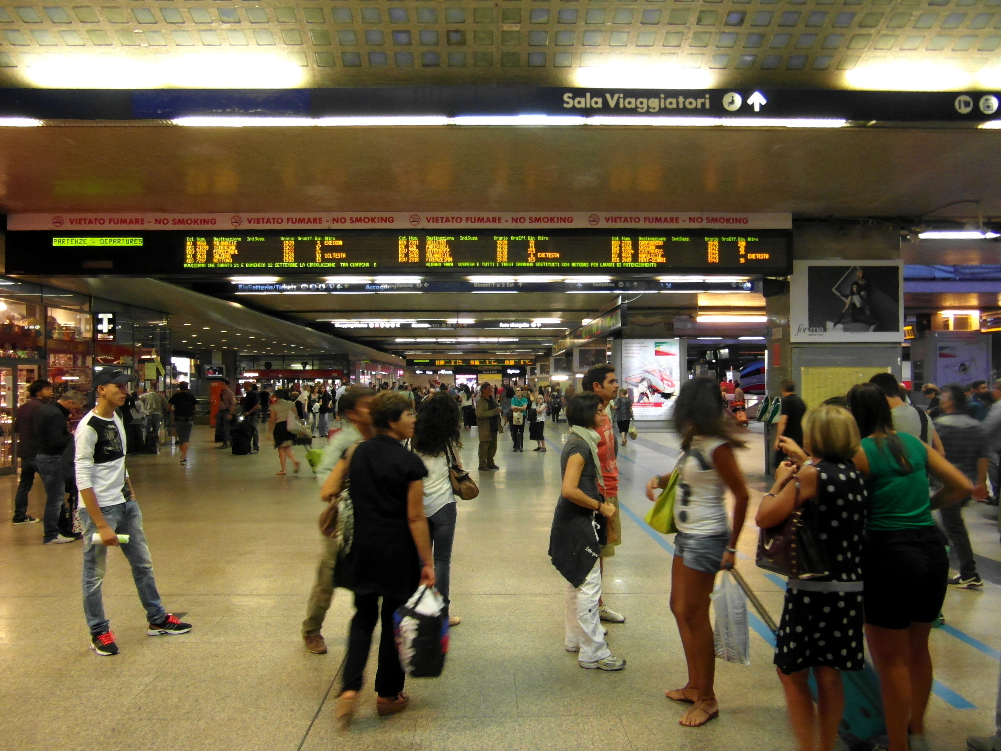 Stazione di Roma Termini Roma Termini railway station Bahnhof Roma Termini